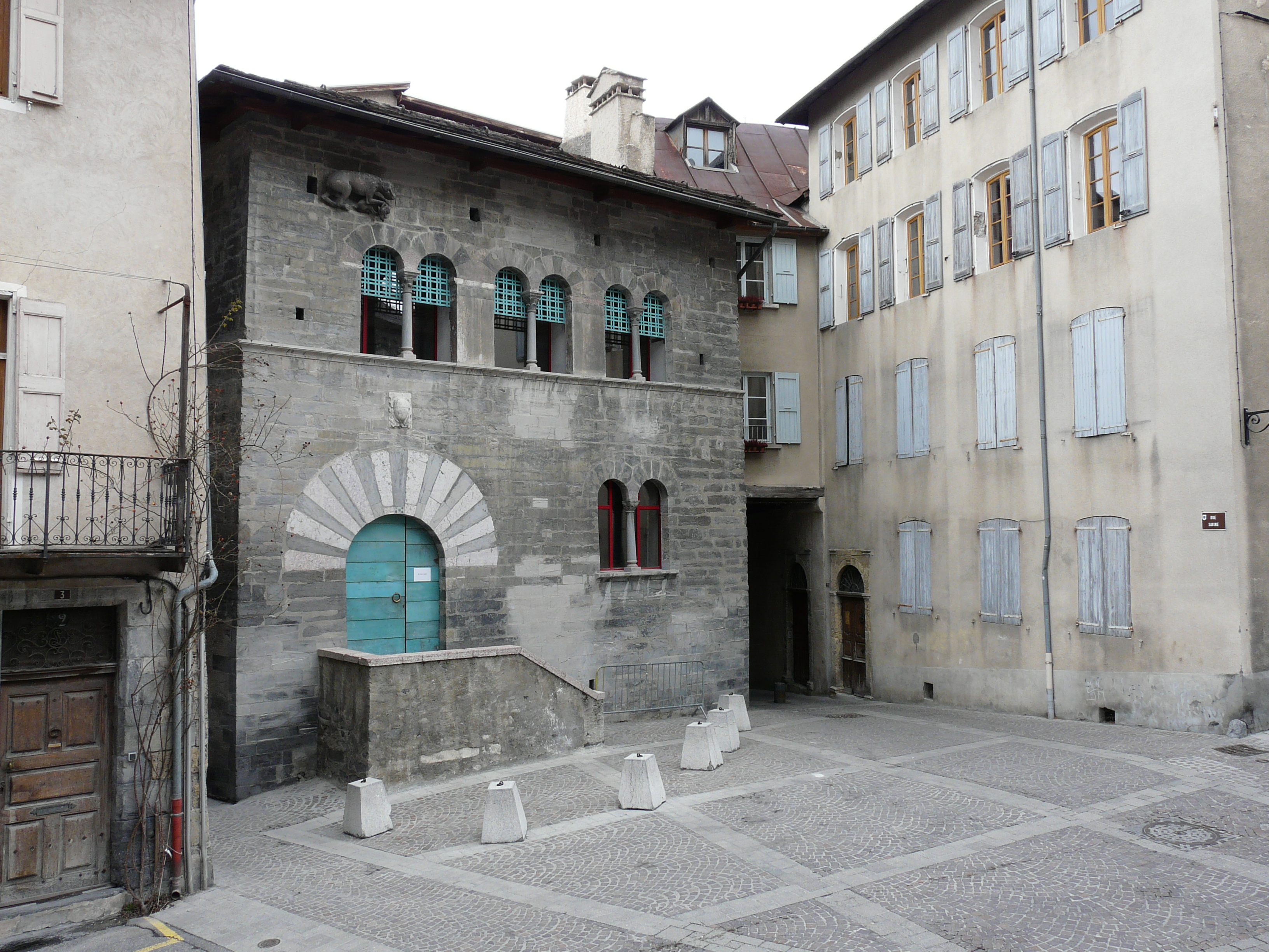 Maison des Chanonges. Embrun .